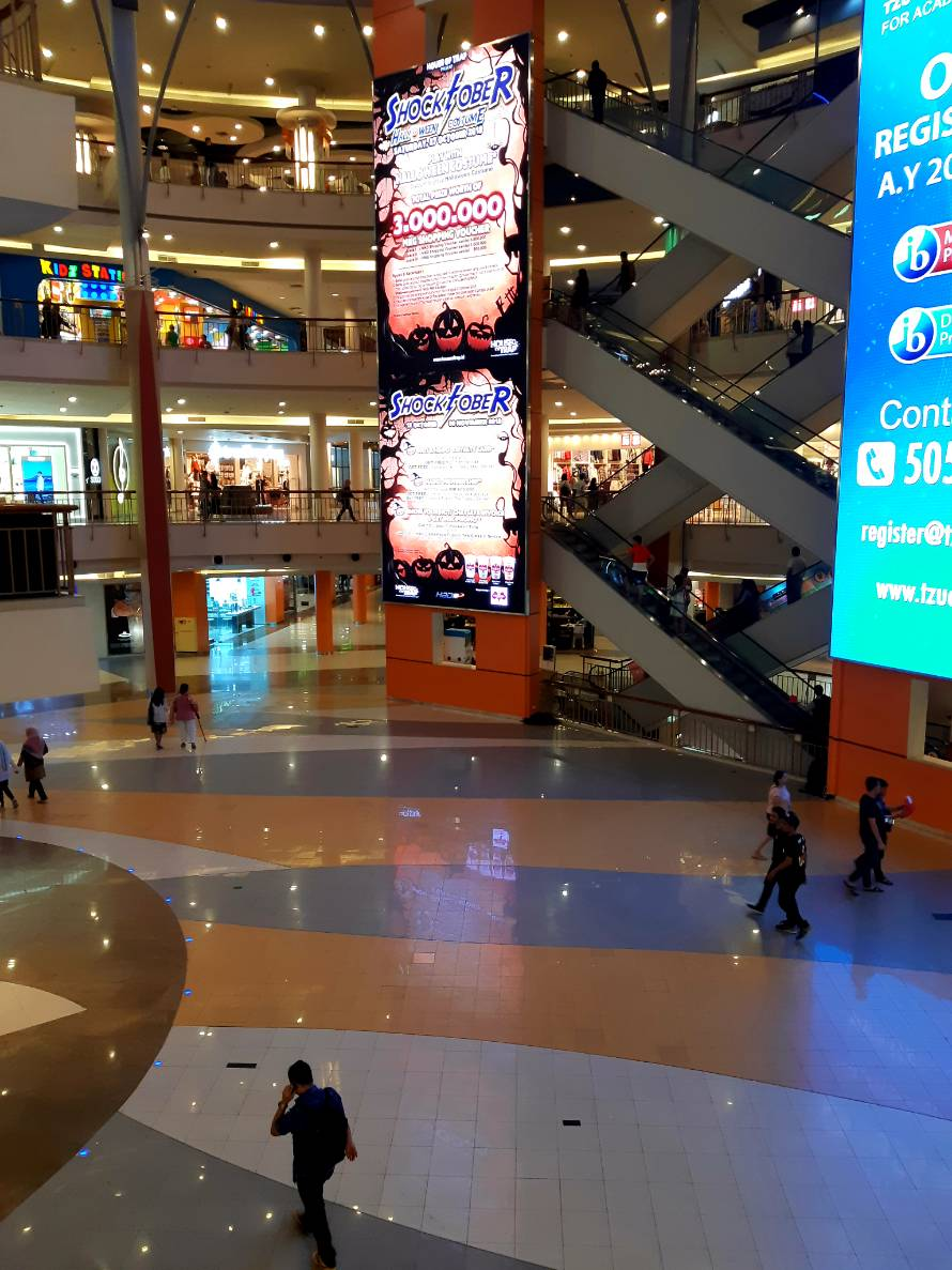 Tampak dalam Mall Kelapa Gading 3